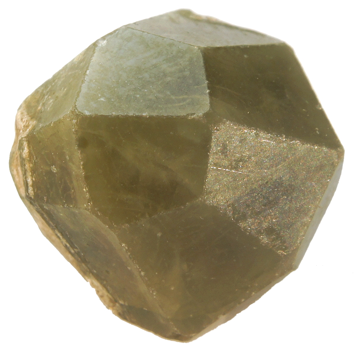 Гроссуляр (Grossular) (из россыпи, диаметр 15х15х18 мм.) Из коллекции Государственного геологического музея им. В. И. Вернадского Российской академии наук. Сборы Юсс В. до 1916 г., река. Ахтарагда, Якутия, Россия.